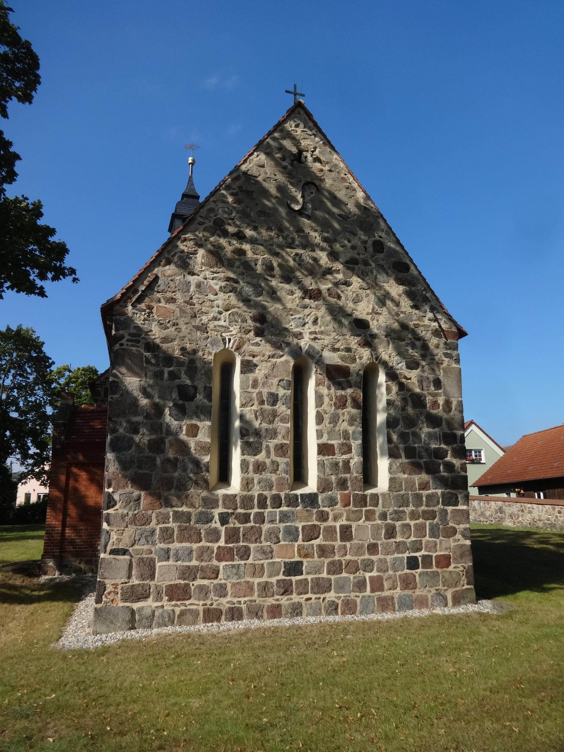 Die Feldsteinkirche wurde in der zweiten Hälfte des 13. Jahrhunderts erbaut. Im 15. Jahrhundert kam der Westturm hinzu, der 1753 einen Aufsatz erhielt. In seinem Innern befinden sich unter anderem ein Altar aus dem Anfang des 18. Jahrhunderts sowie eine Fünte aus dem 19. Jahrhundert.